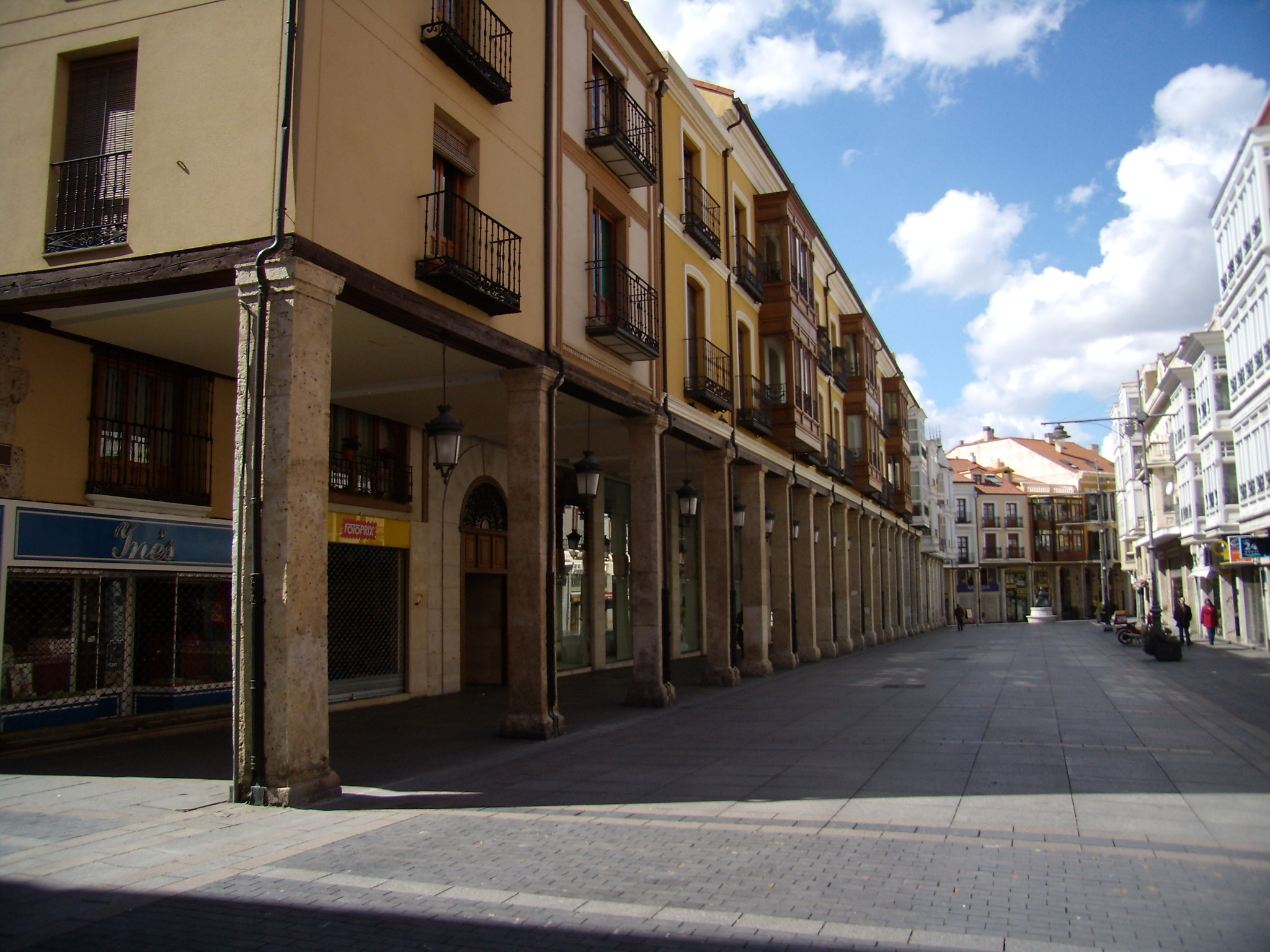 Soportales de la Calle Mayor de Palencia.